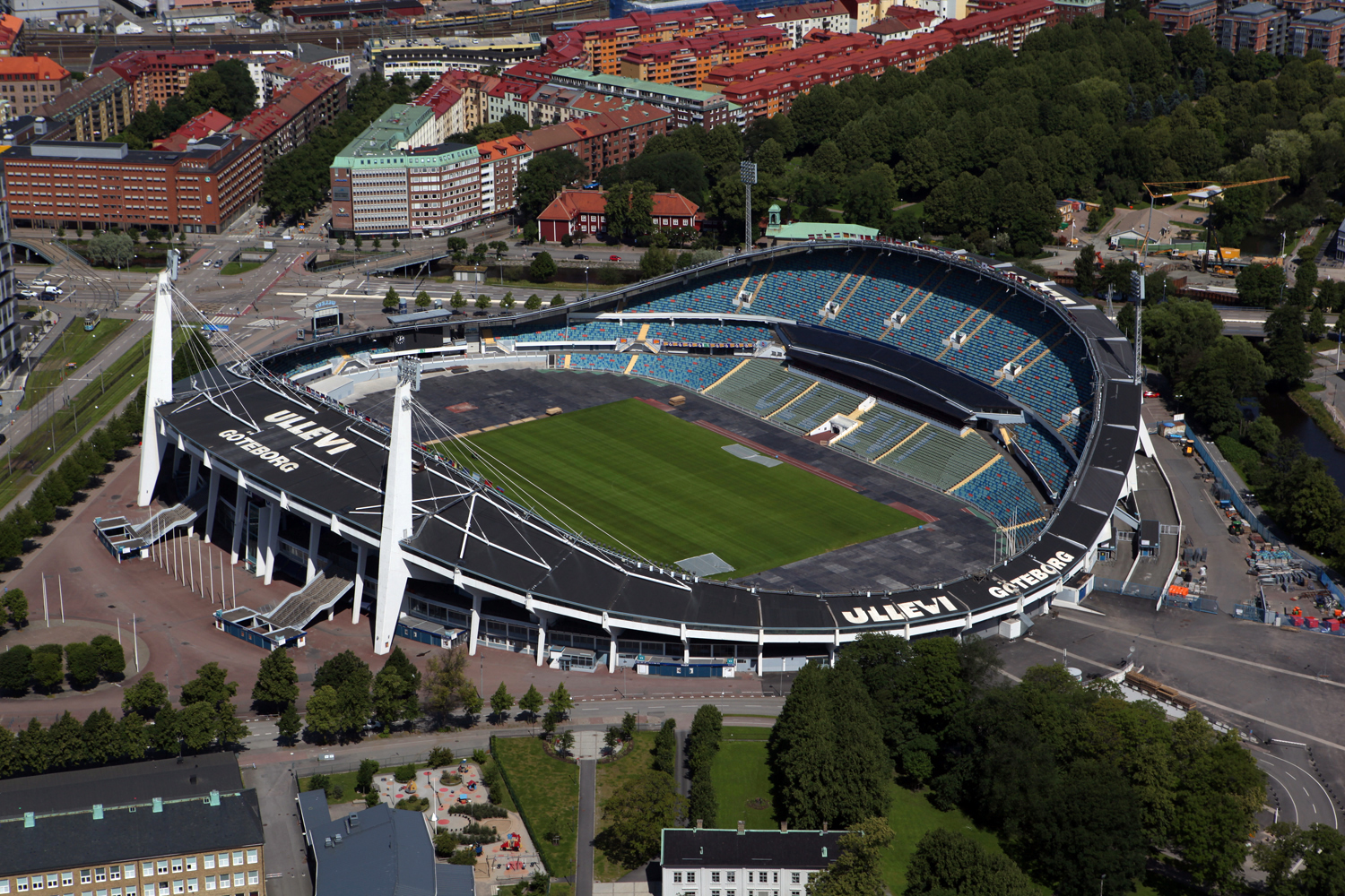 Nya Ullevi Arena i Göteborg.